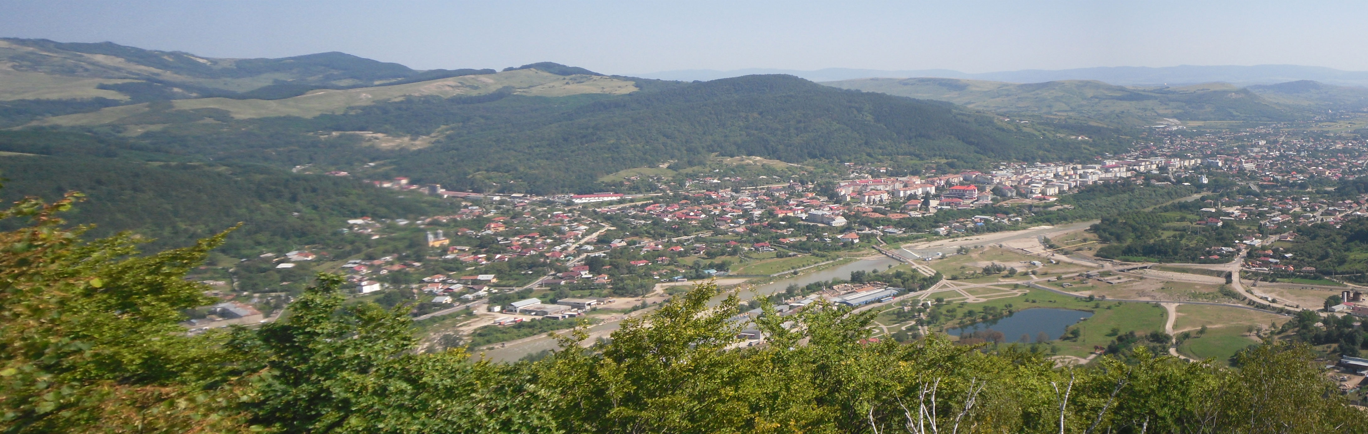 Panoramă a orașului Târgu Ocna compusă din 3 fotografii realizate de mine.